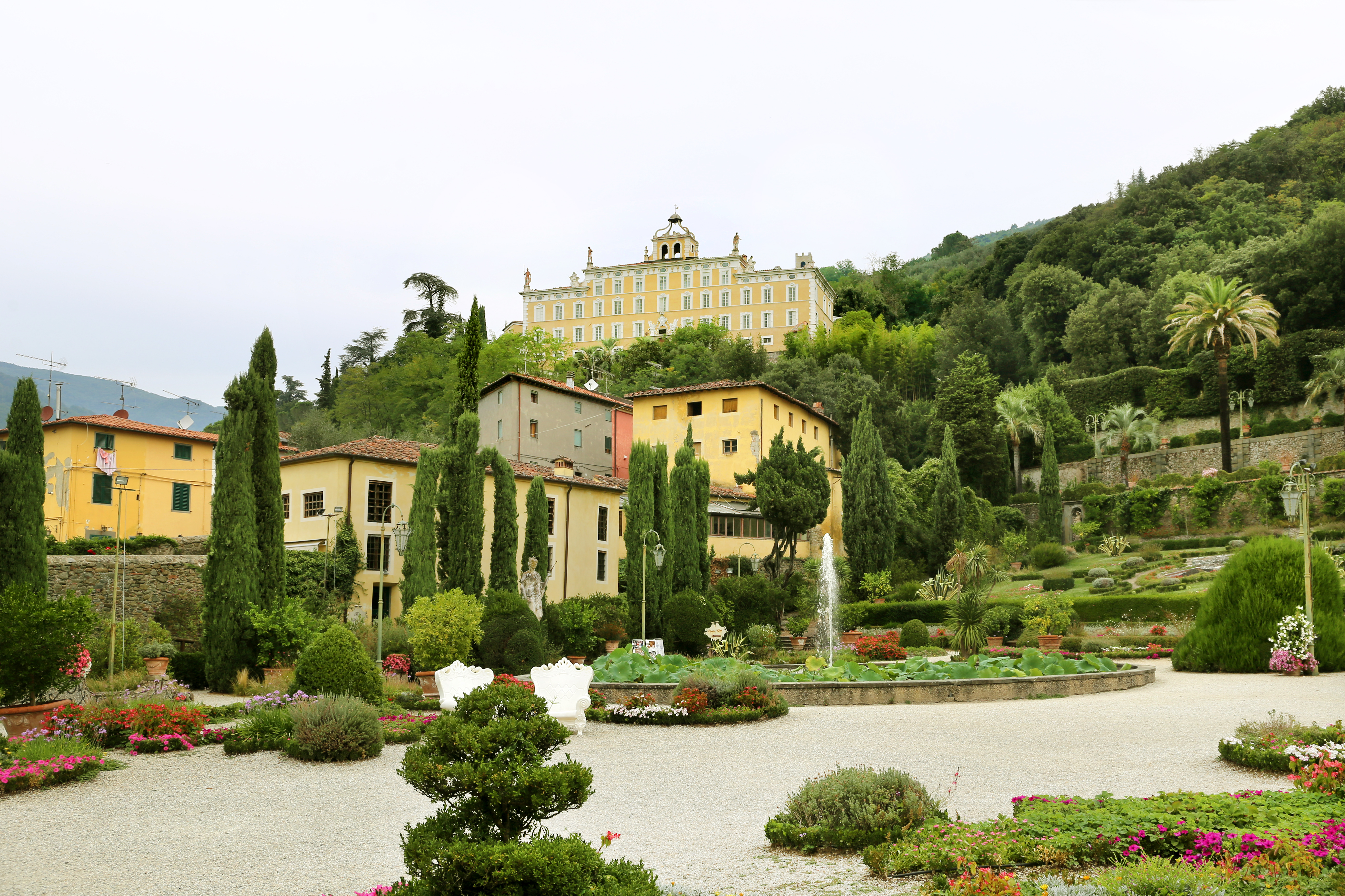 Giardino di Villa Garzoni This is a photo of a monument which is part of cultural heritage of Italy.